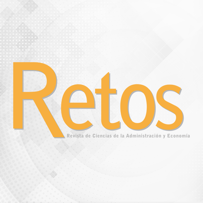 Portada de la revista Retos